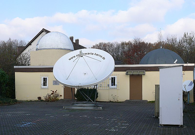 Sternwarte Herne, eigenes Bild